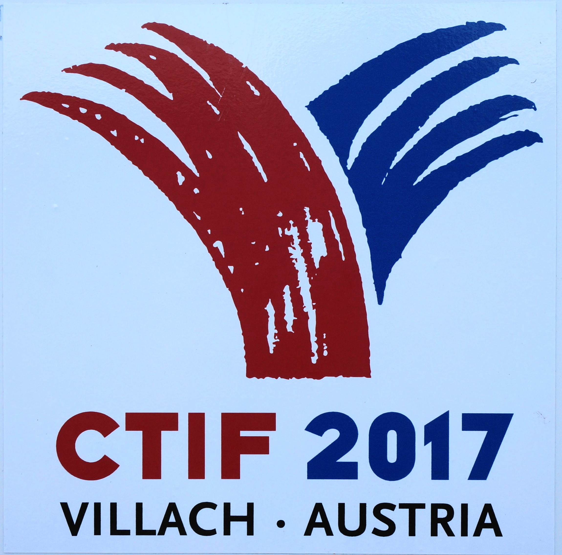 CTIF Internationale Feuerwehrwettbewerbe mit 3000 Teilnehmern aus 35 Nationen vom 09. Juli bis 16. Juli 2017 in Villach, Kärnten, Österreich, EU